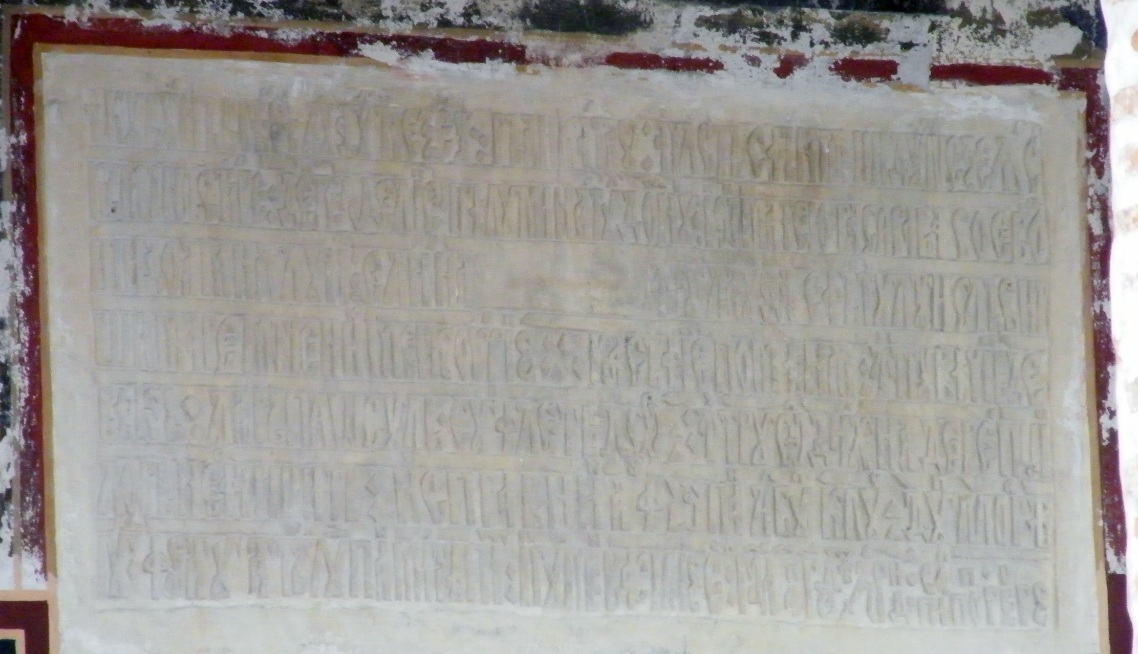 Pisania originală a Mănăstirii Plătăreşti, România - 1646